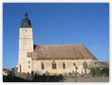 L'église Saint-Martin de Brunelles.